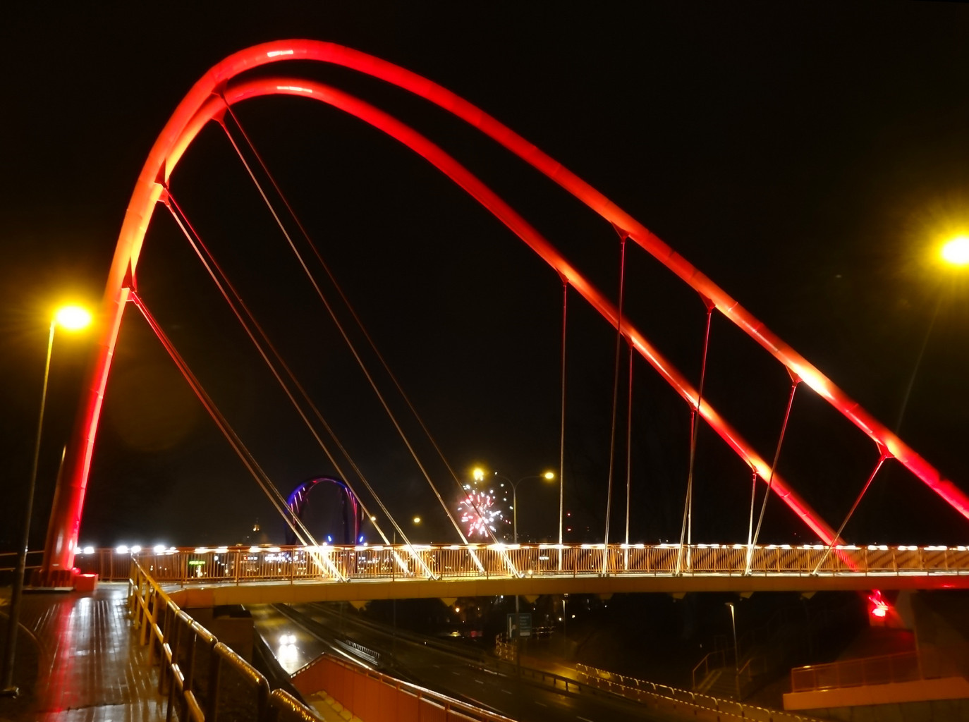 Kładka dla pieszych nad Trasą Uniwersytecką w Bydgoszczy